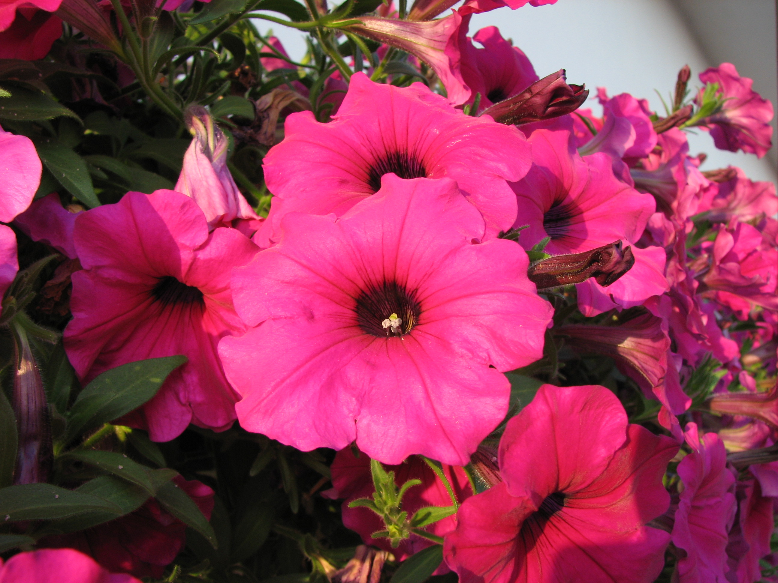 Surfinia